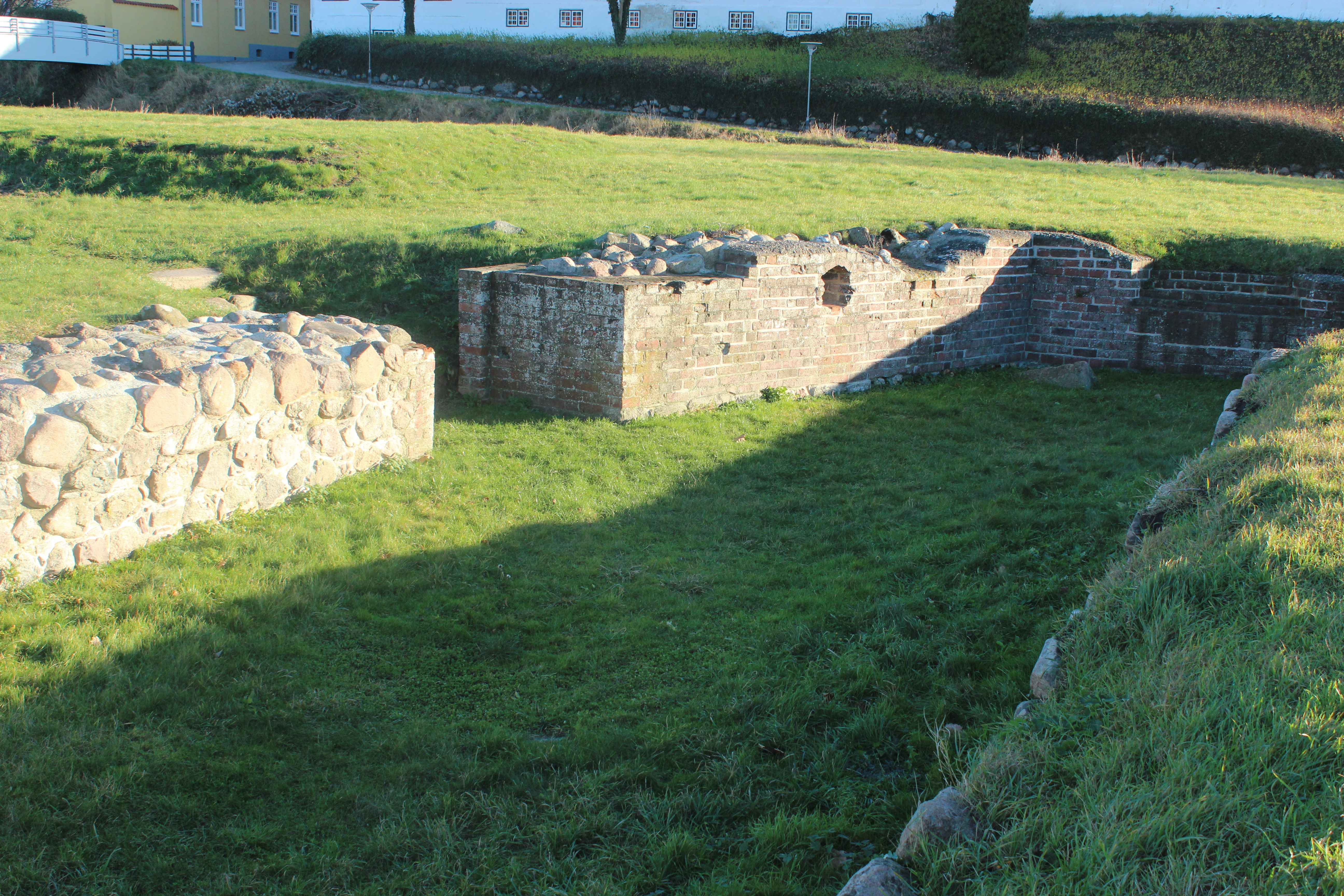 Fundament af Vestborgen i Kalundborg.